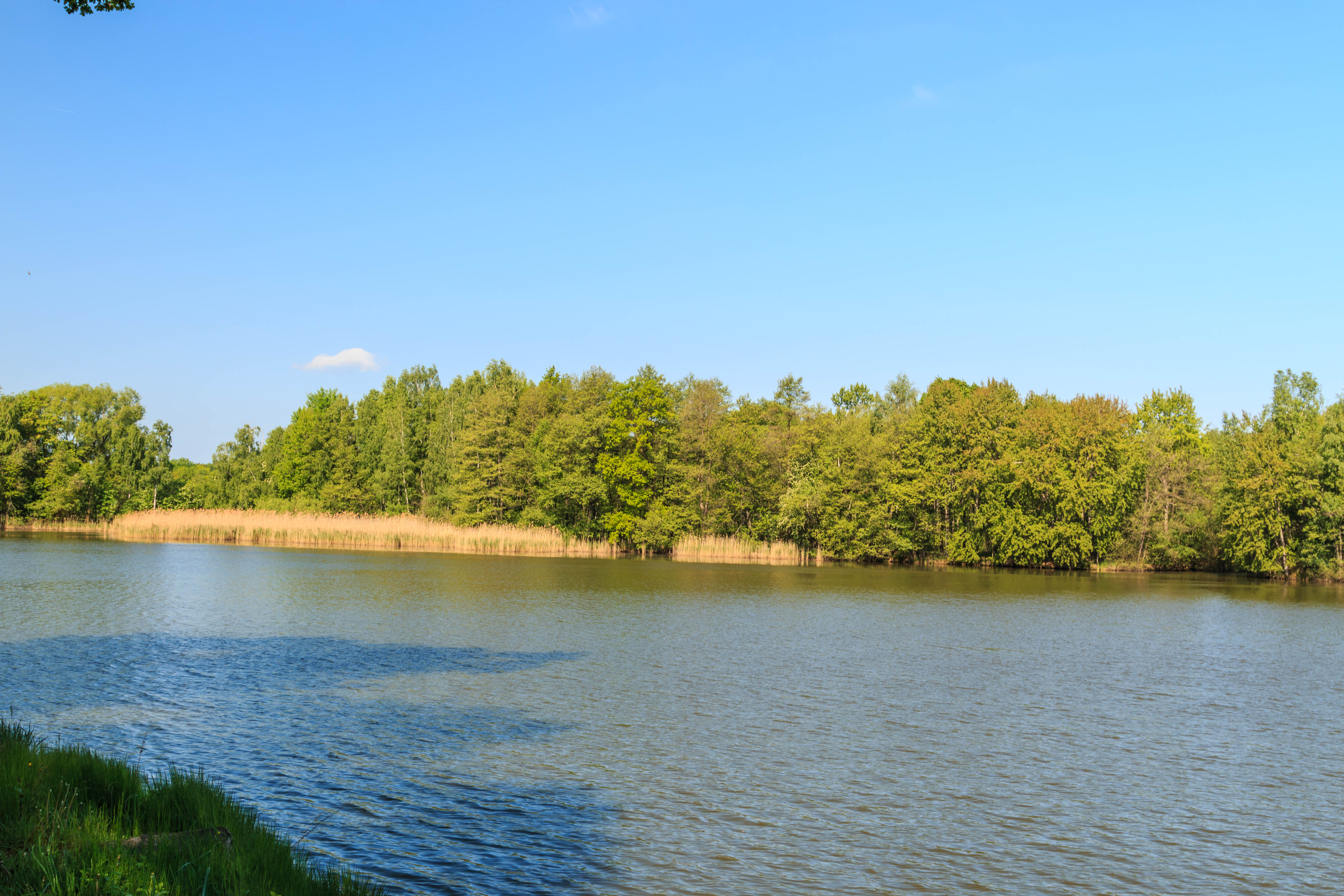 PR Hluboký rybník Project: Chráněná území.